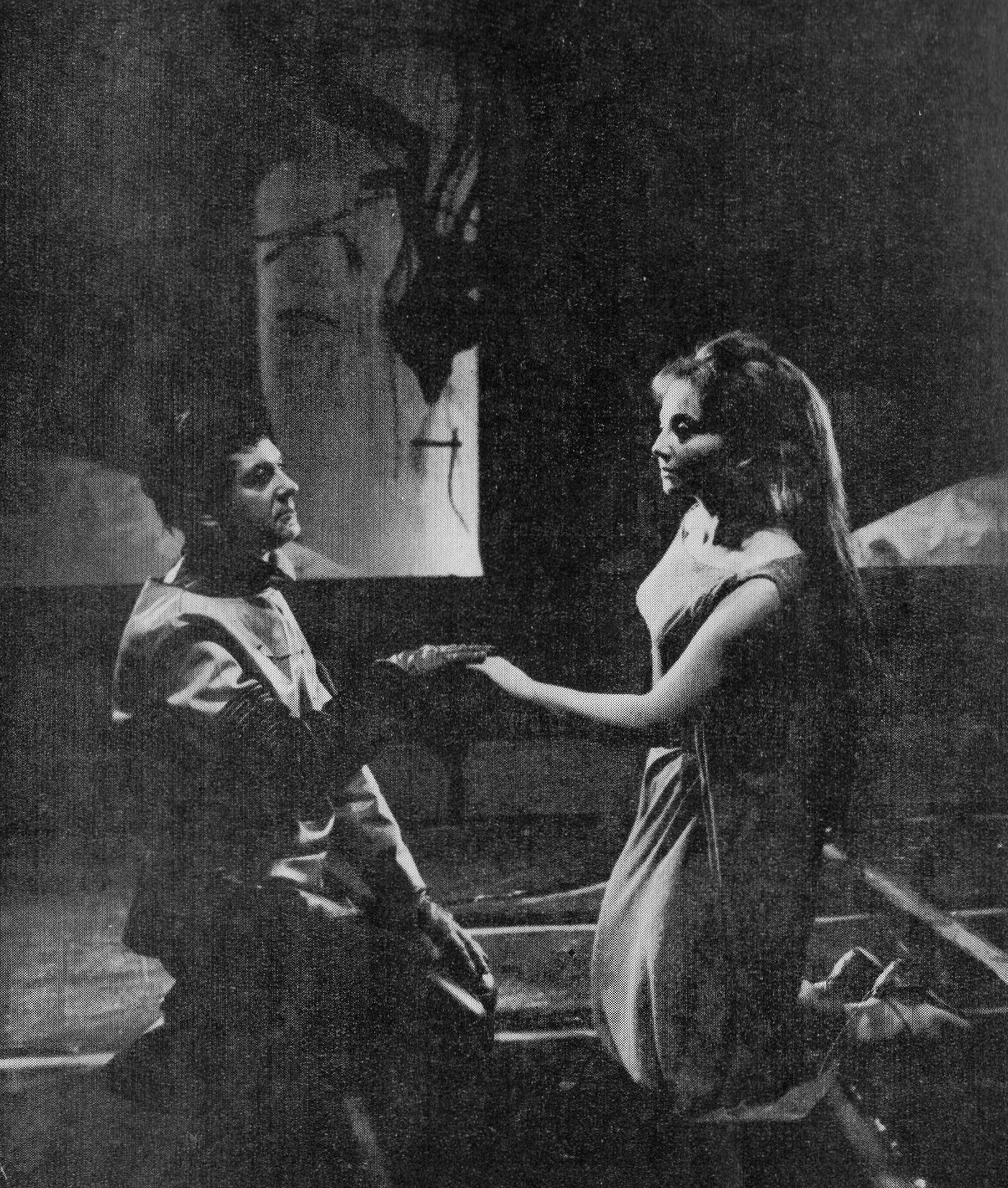 Jan Żardecki i Joanna Jedlewska w 1965 w Warszawie (Ondyna).